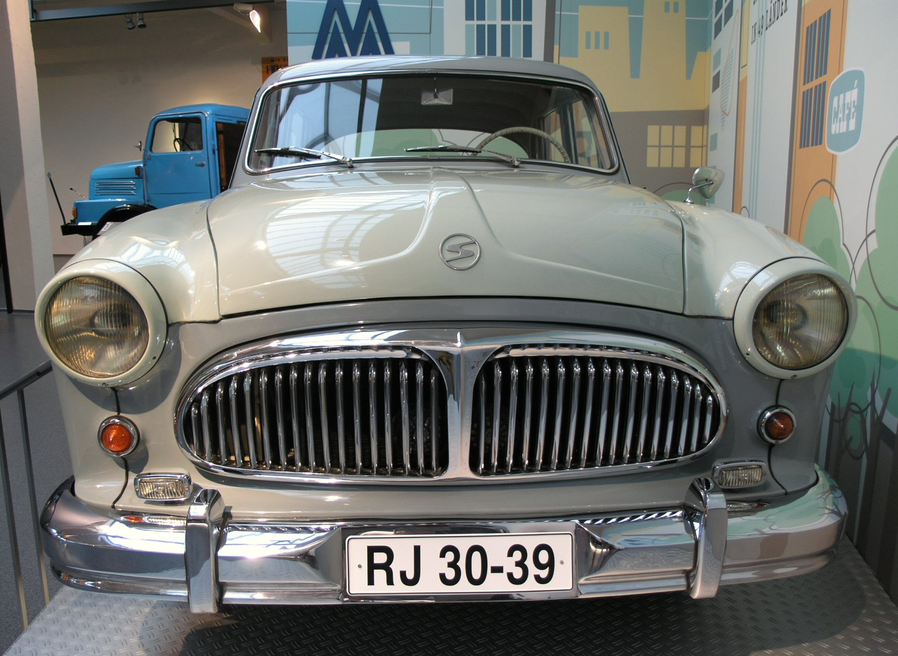 Sachsenring P 240